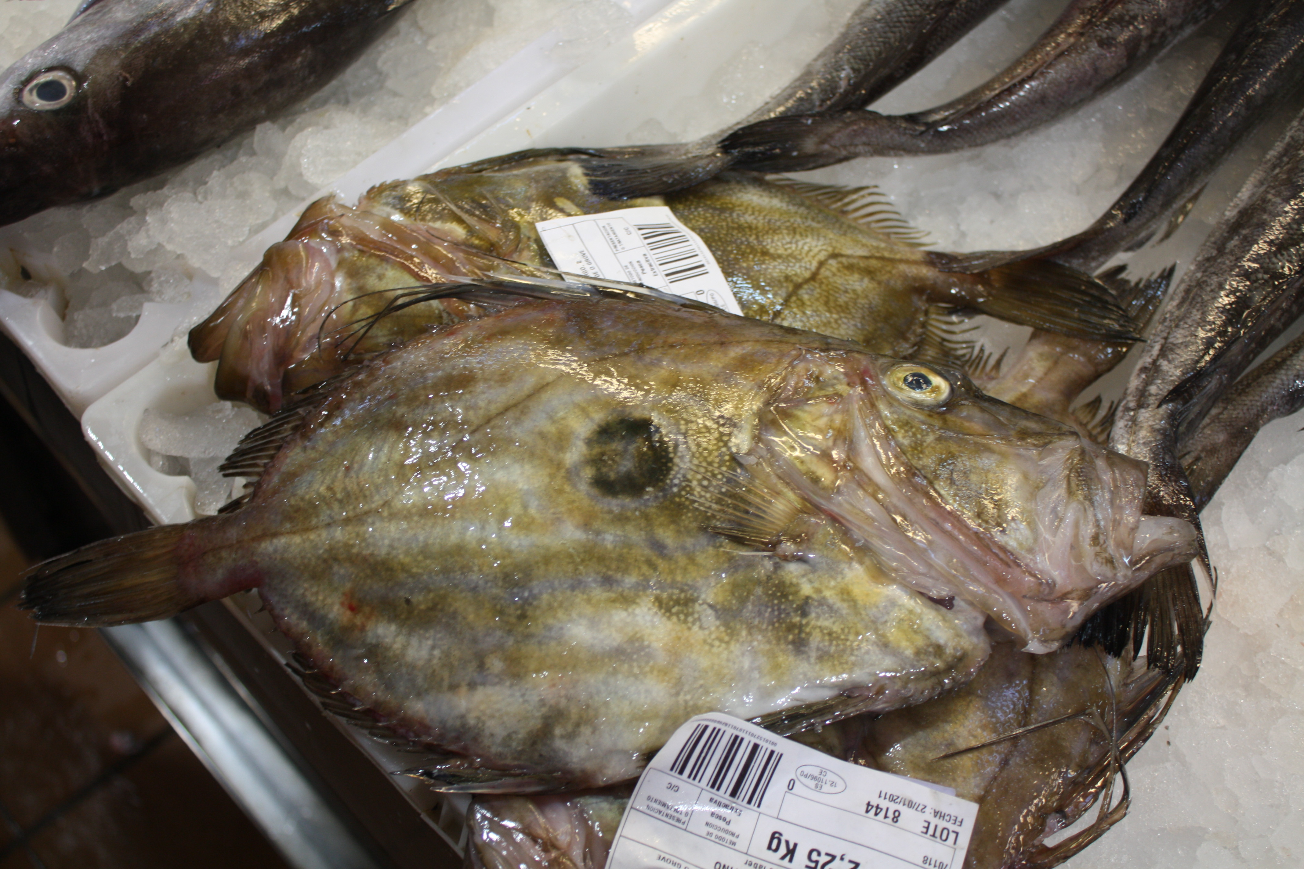 Lote de sanmartiño (Zeus faber) exposto á venda.